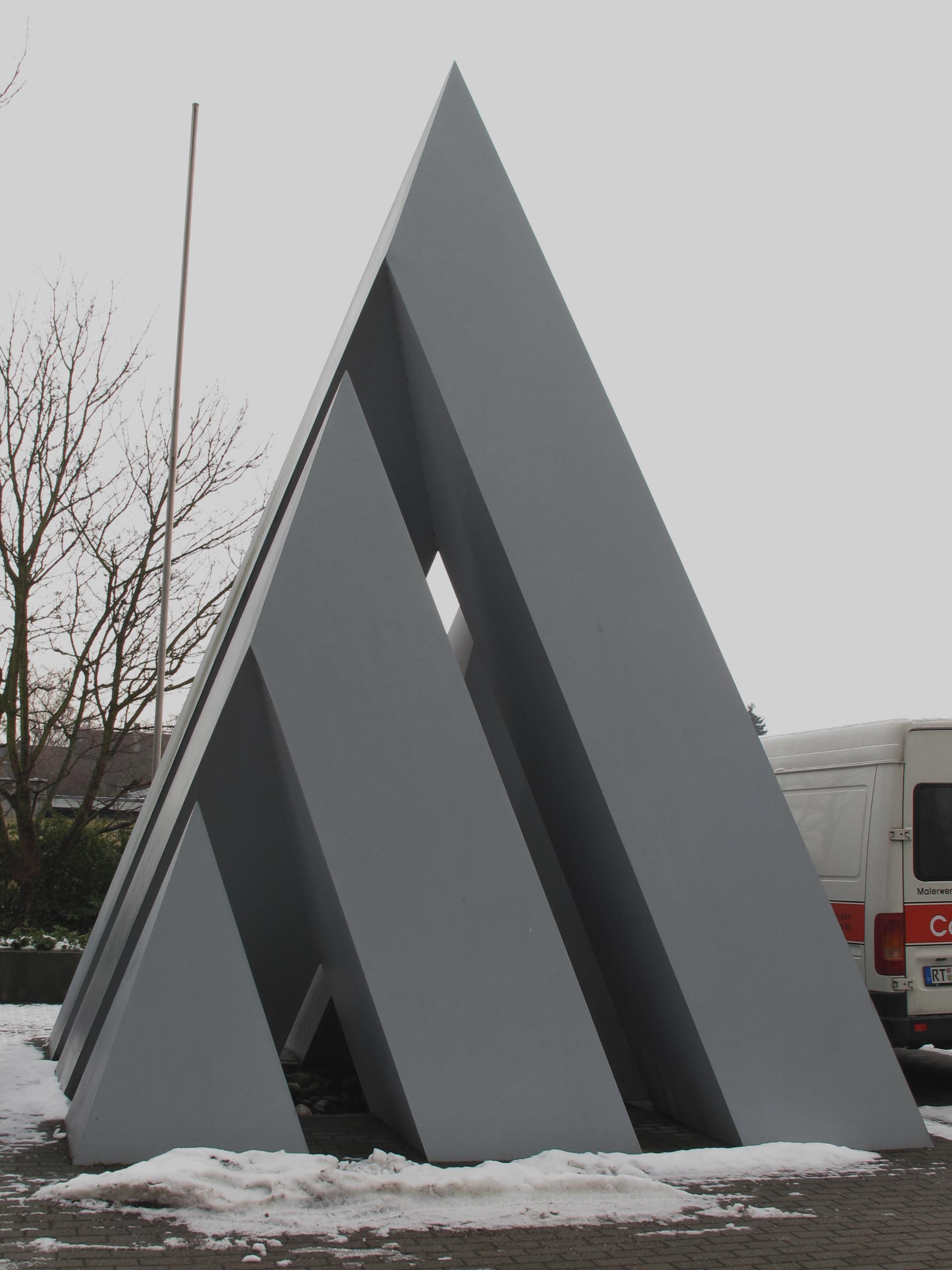 Bernard Schottlander, Pyramide, 1976 (Signatur: BS-76), - Deutschland, Baden-Württemberg, Tübingen, Konrad-Adenauerstr. 30, vor der Polizeidirektion Tübingen